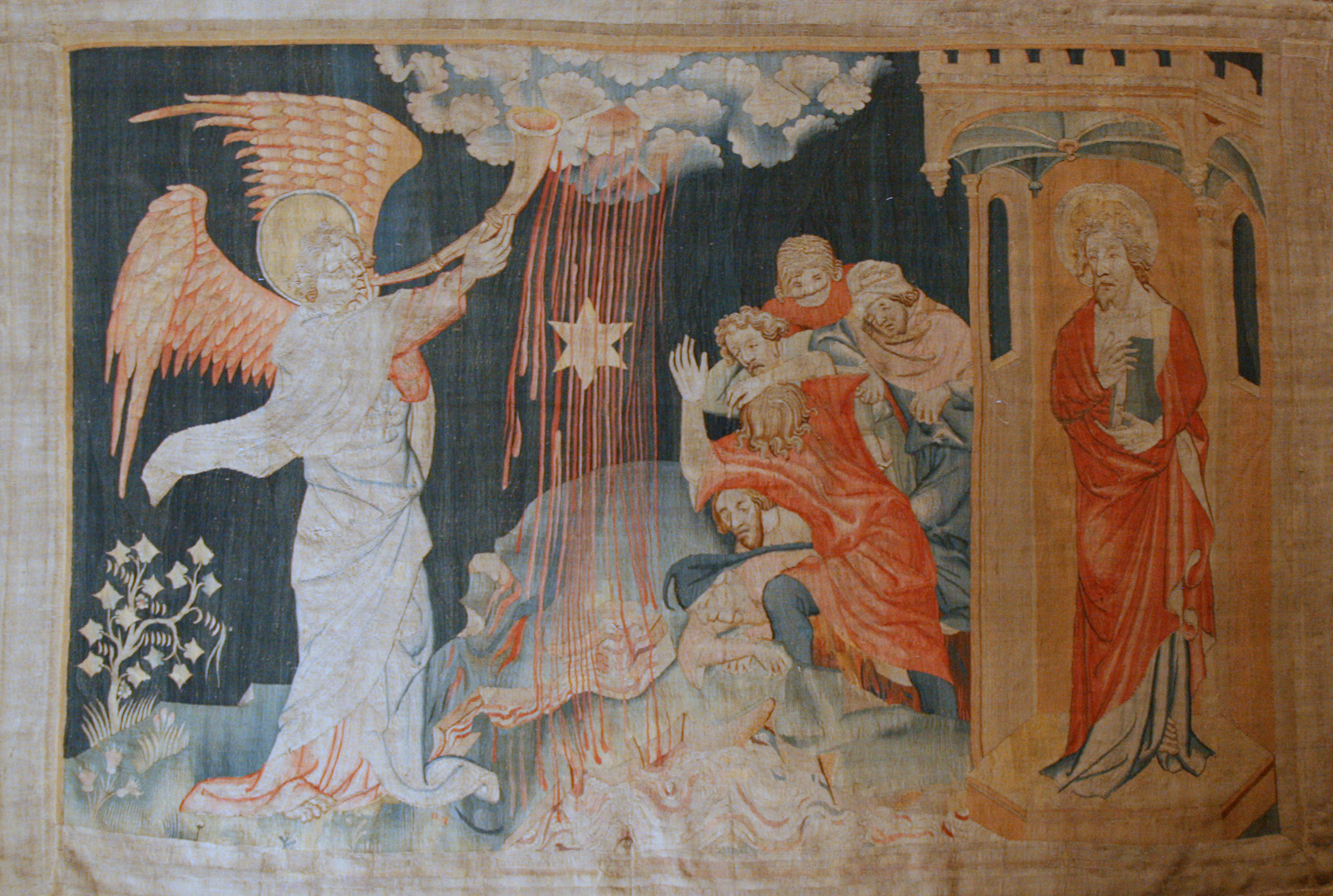 L'Apocalypse au château d'Angers